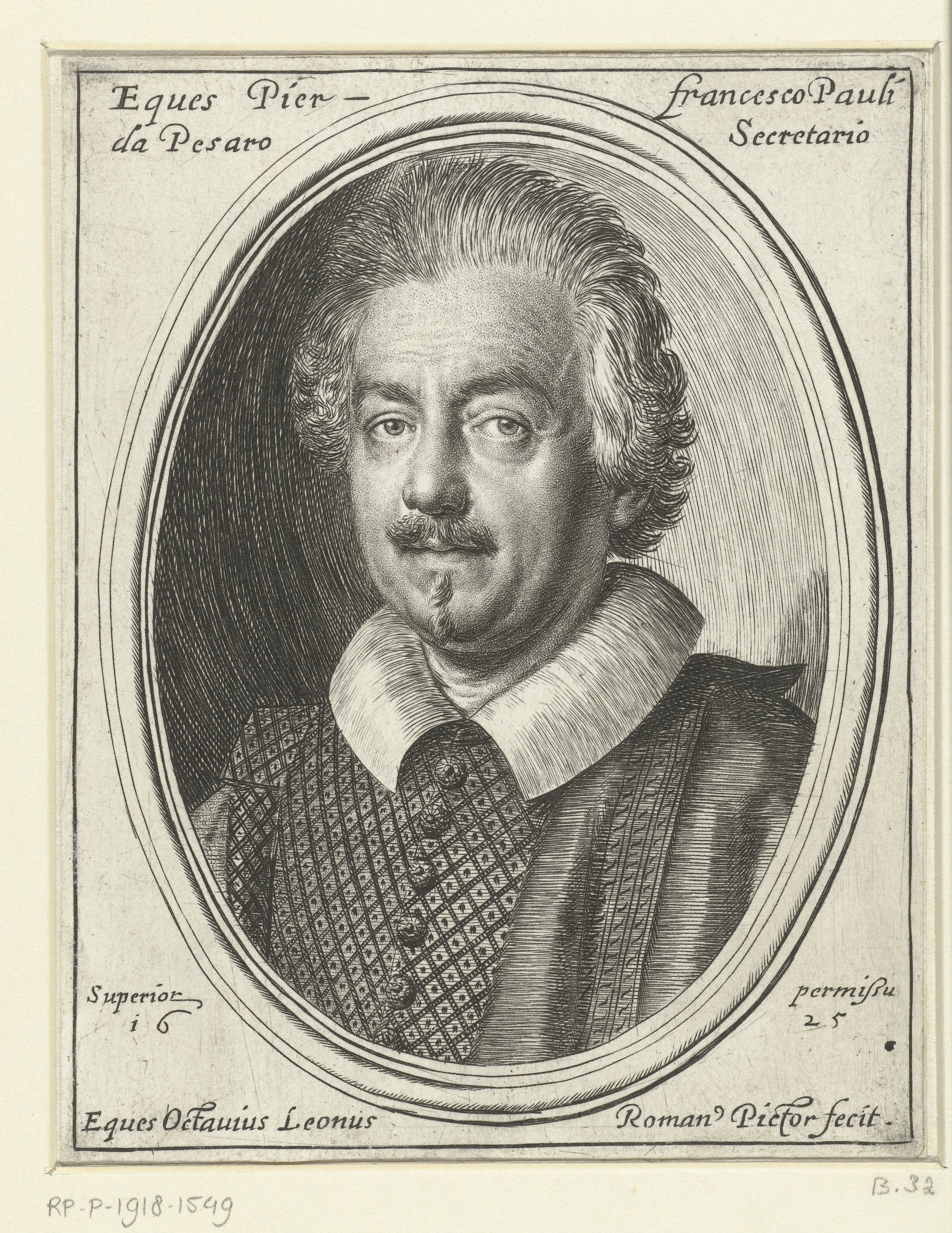 IdentificatieTitel(s): Portret van Pier Francesco PauliEques Pier francesco Pauli da Pesaro Secretario (titel op object)Objecttype: prent Objectnummer: RP-P-1918-1549Catalogusreferentie: The Illustrated Bartsch 32Opschriften / Merken: verzamelaarsmerk, verso midden, gestempeld: Lugt 2233Omschrijving: Portret van de pauselijke secretaris Pier Francesco Pauli.VervaardigingVervaardiger: prentmaker: Ottavio Mario Leoni (vermeld op object)naar eigen ontwerp van: Ottavio Mario LeoniPlaats vervaardiging: ItaliëDatering: 1625Fysieke kenmerken: ets en stippeletsMateriaal: papier Techniek: etsenAfmetingen: blad: h 143 mm × b 112 mmToelichtingCollectie FrankenOnderwerpWie: Pier Francesco PauliVerwerving en rechtenCredit line: Schenking van de heer C.P.D. PapeVerwerving: schenking 1918Copyright: Publiek domein